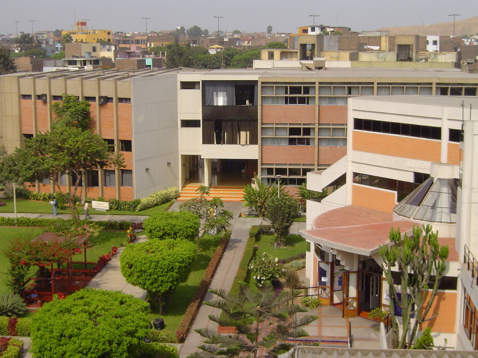 Campus UPCH, en el distrito de San Martín de Porres (Lima), conocido como campus norte o campus central